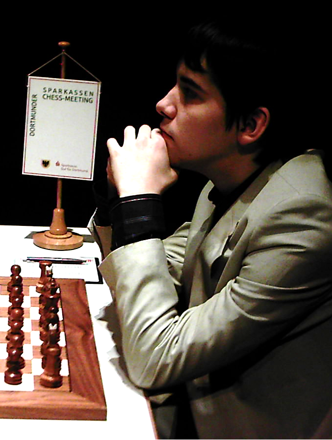 Ian Nepomniachtchi, 1. Runde der Dortmunder Schachtage 2008.